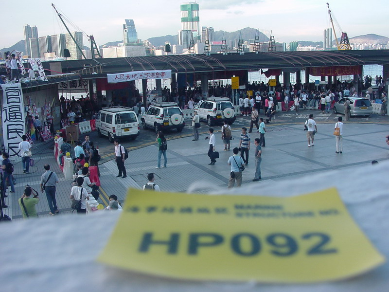 保留皇后碼頭事件，亞視新聞與無綫新聞採訪車停在皇后碼頭採訪。